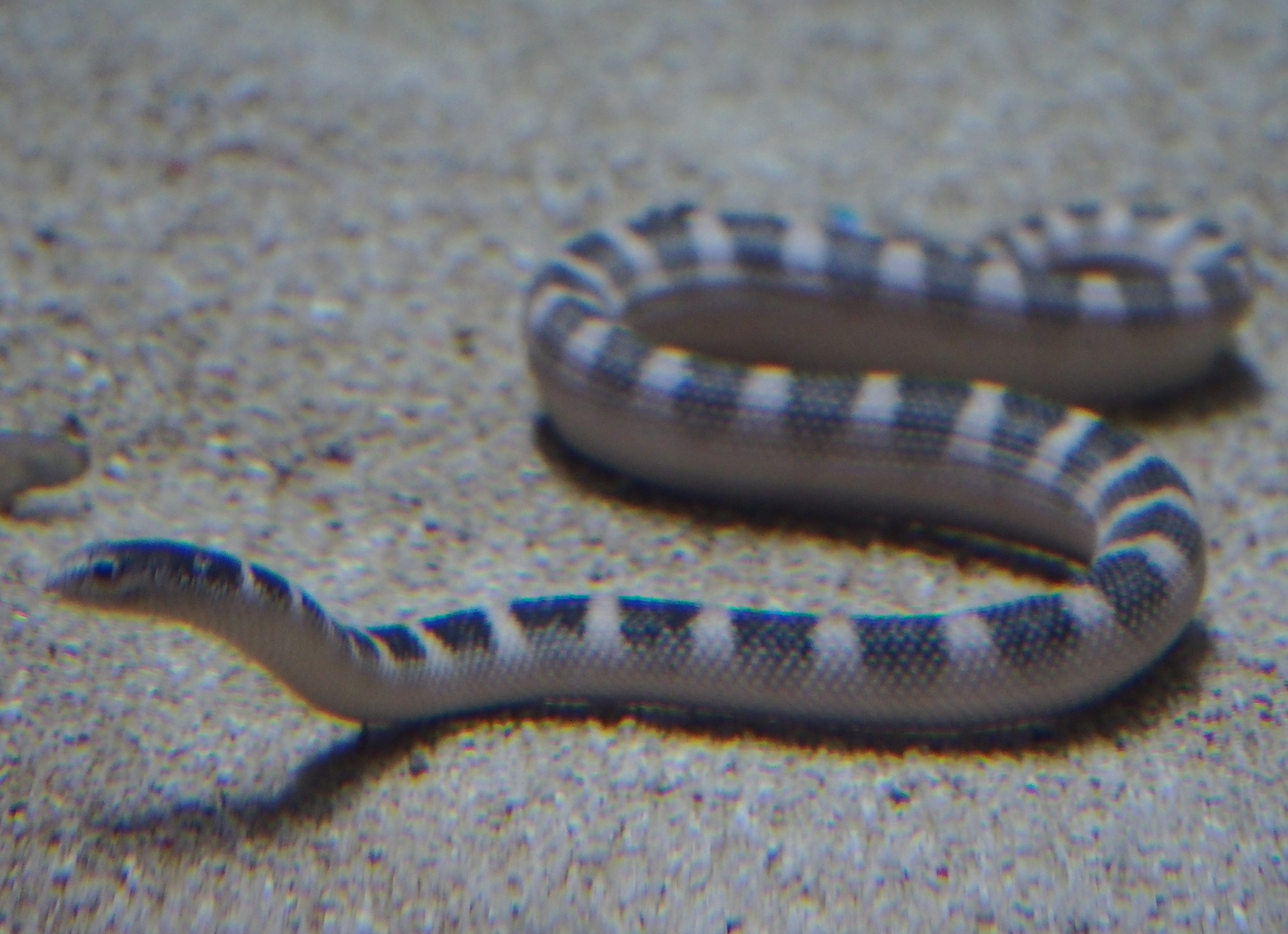 クロボシウミヘビ. at Suma aquarium.